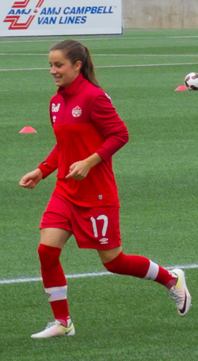 Jessie Fleming (17)